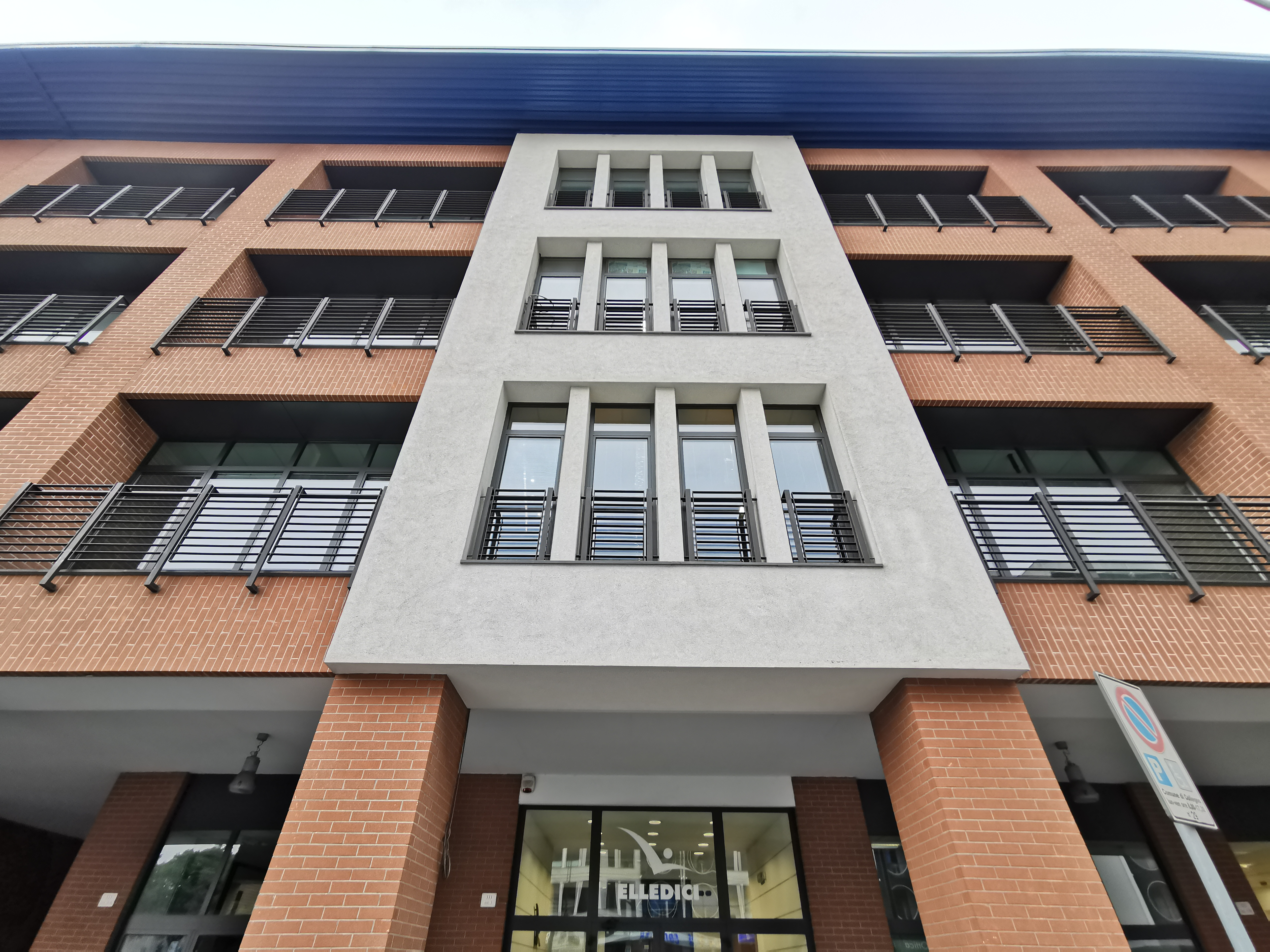 Sede Editrice Elledici